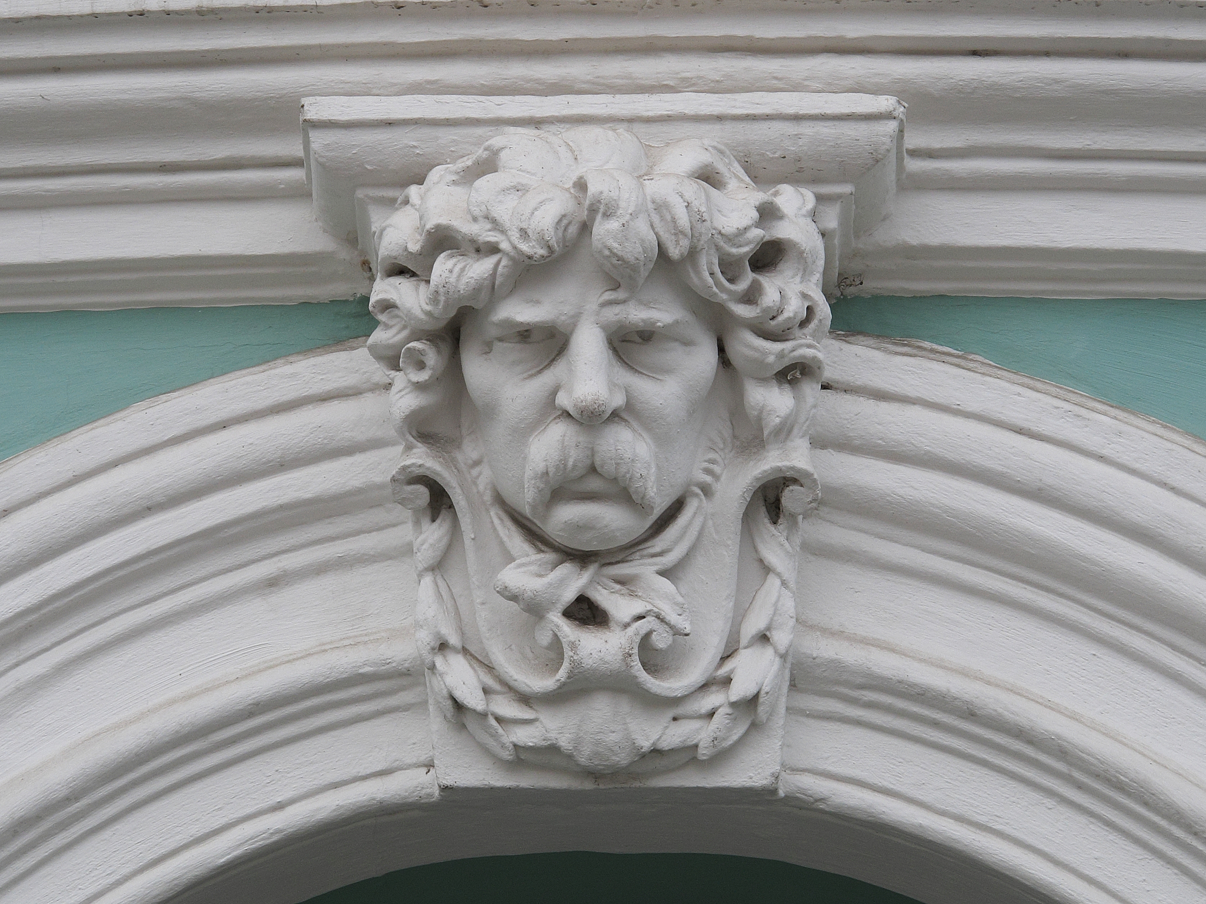 Земська управа (Будинок, пов'язаний з революційними подіями 1905 року) (мур.), Суми, вул. Г. Кондратьєва, 2